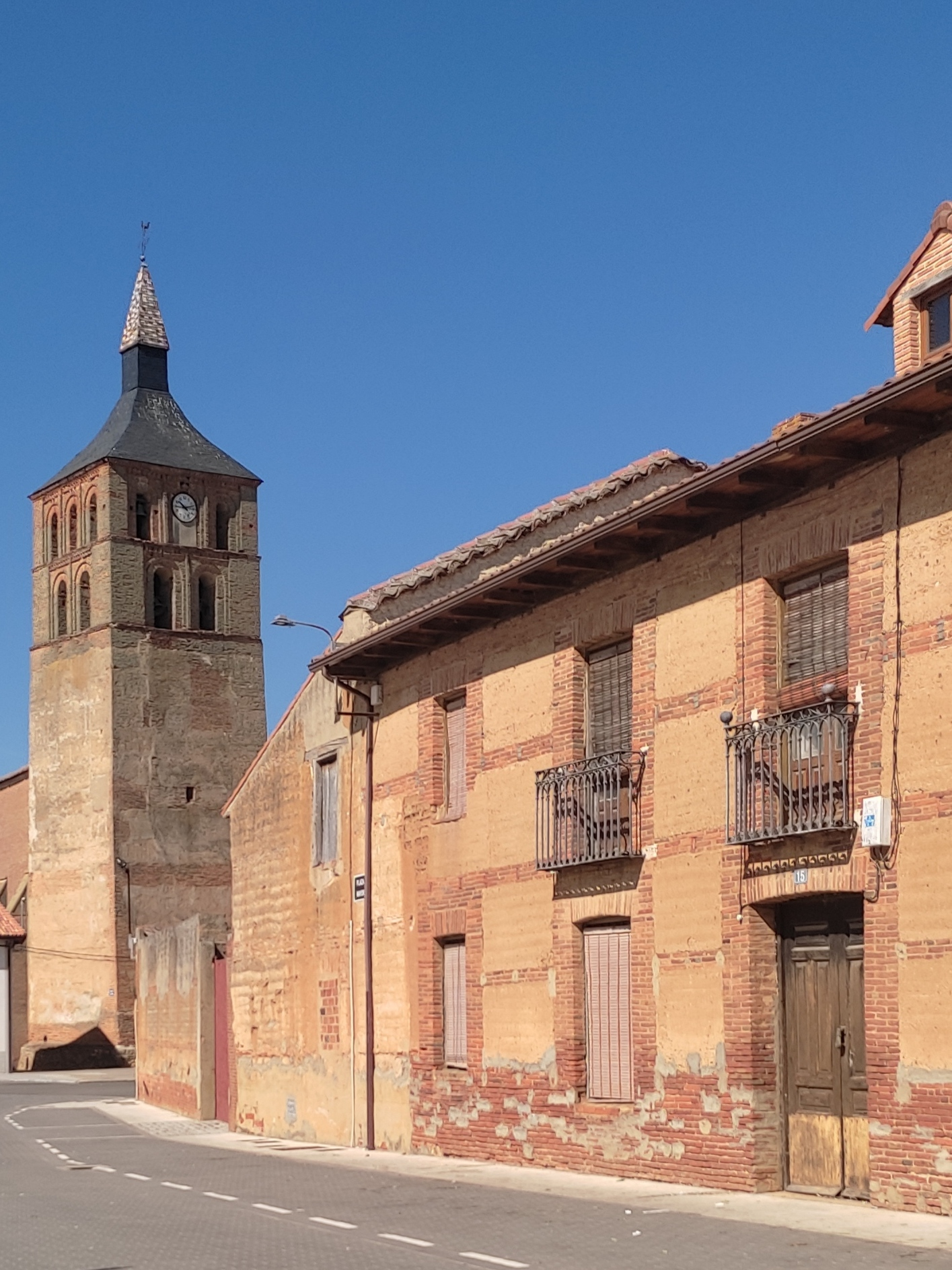 Arquitectura tradicional en Villademor de la Vega, al sur de la provincia de León, en la comunidad autónoma de Castilla y León, España. Torre de tapial y ladrillo de estilo mudéjar y casa construida con los mismos materiales y con balcones forjados.